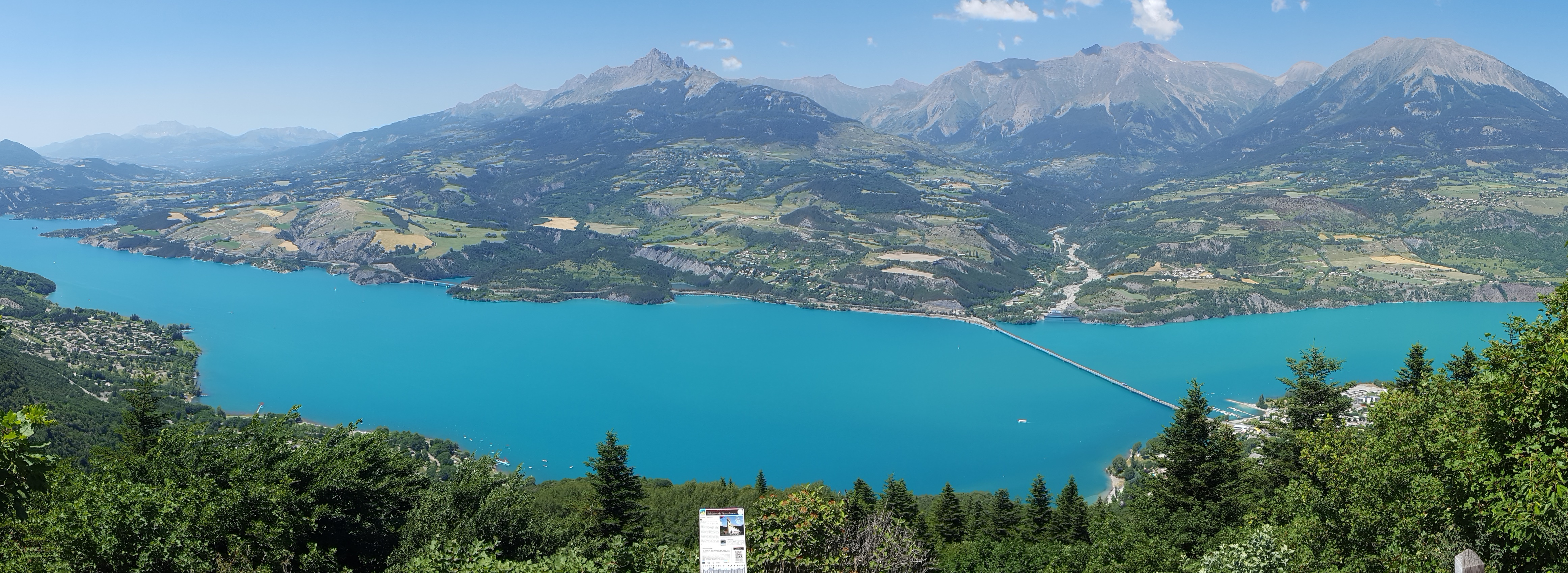 Le lac Serre Poncon, depuis le belvédère Pierre Arnoux